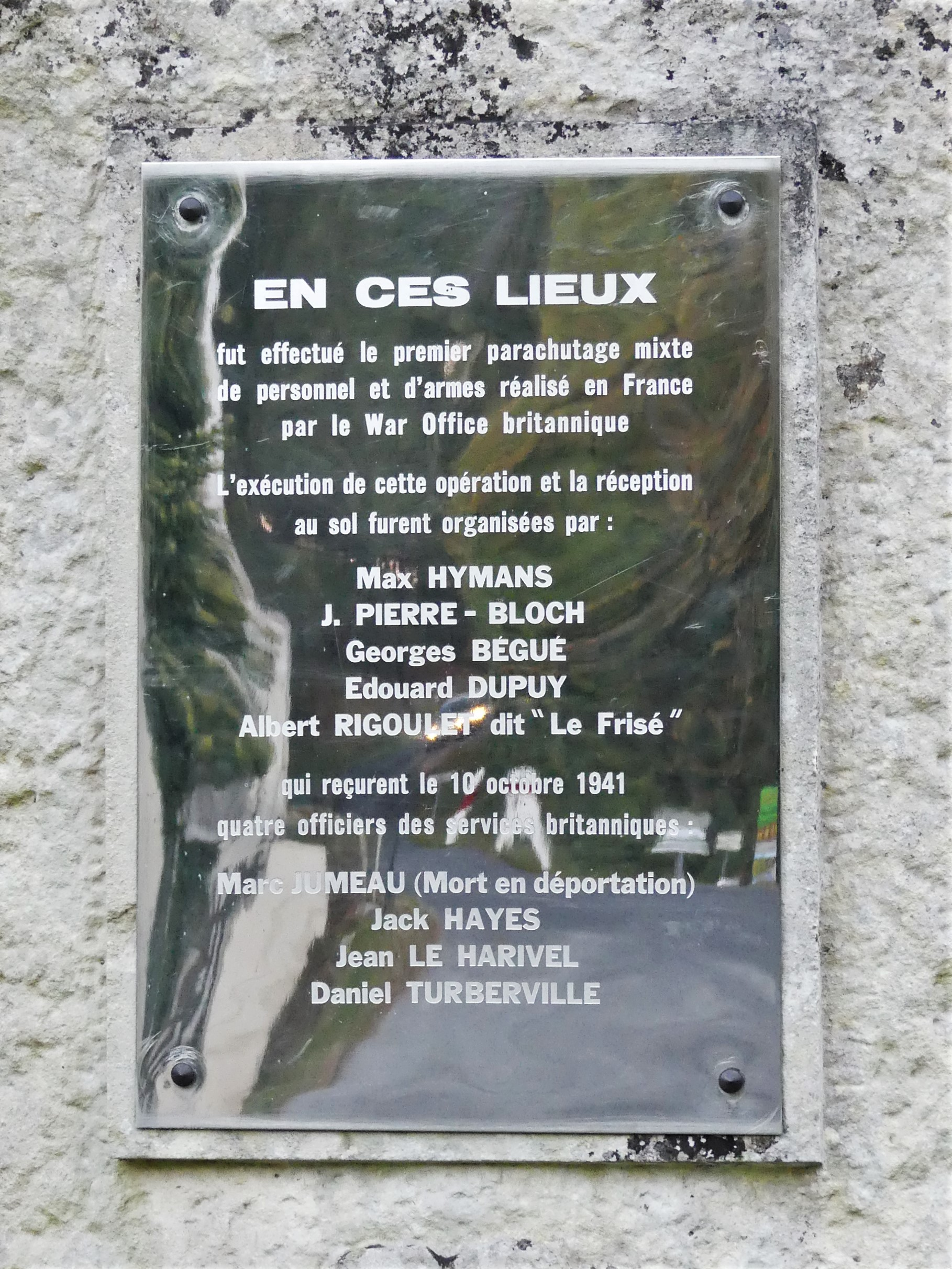 La plaque de la stèle de Lagudal, Beleymas, Dordogne, France.